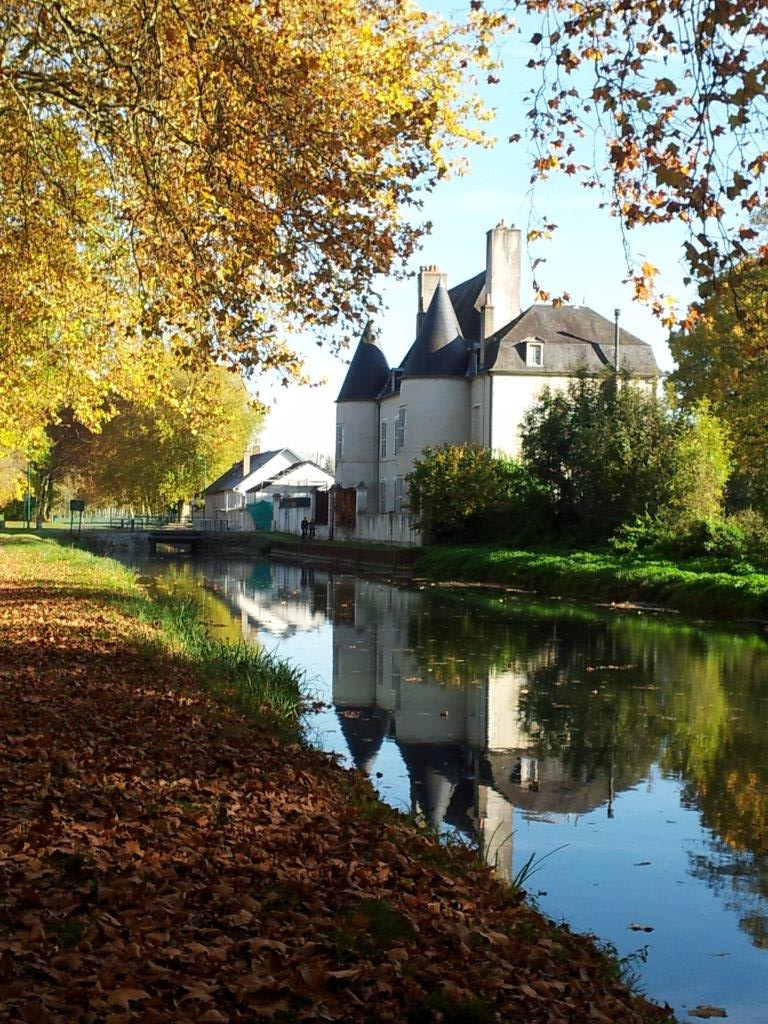 Le long du canal de Berry